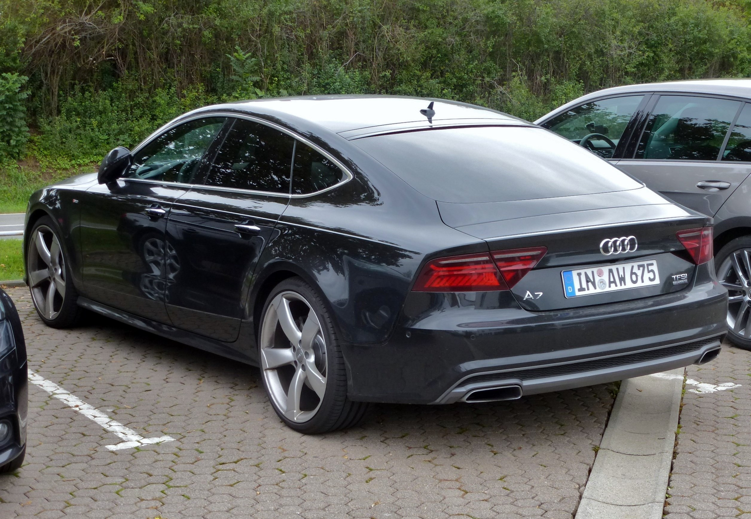 Audi A7 Facelift